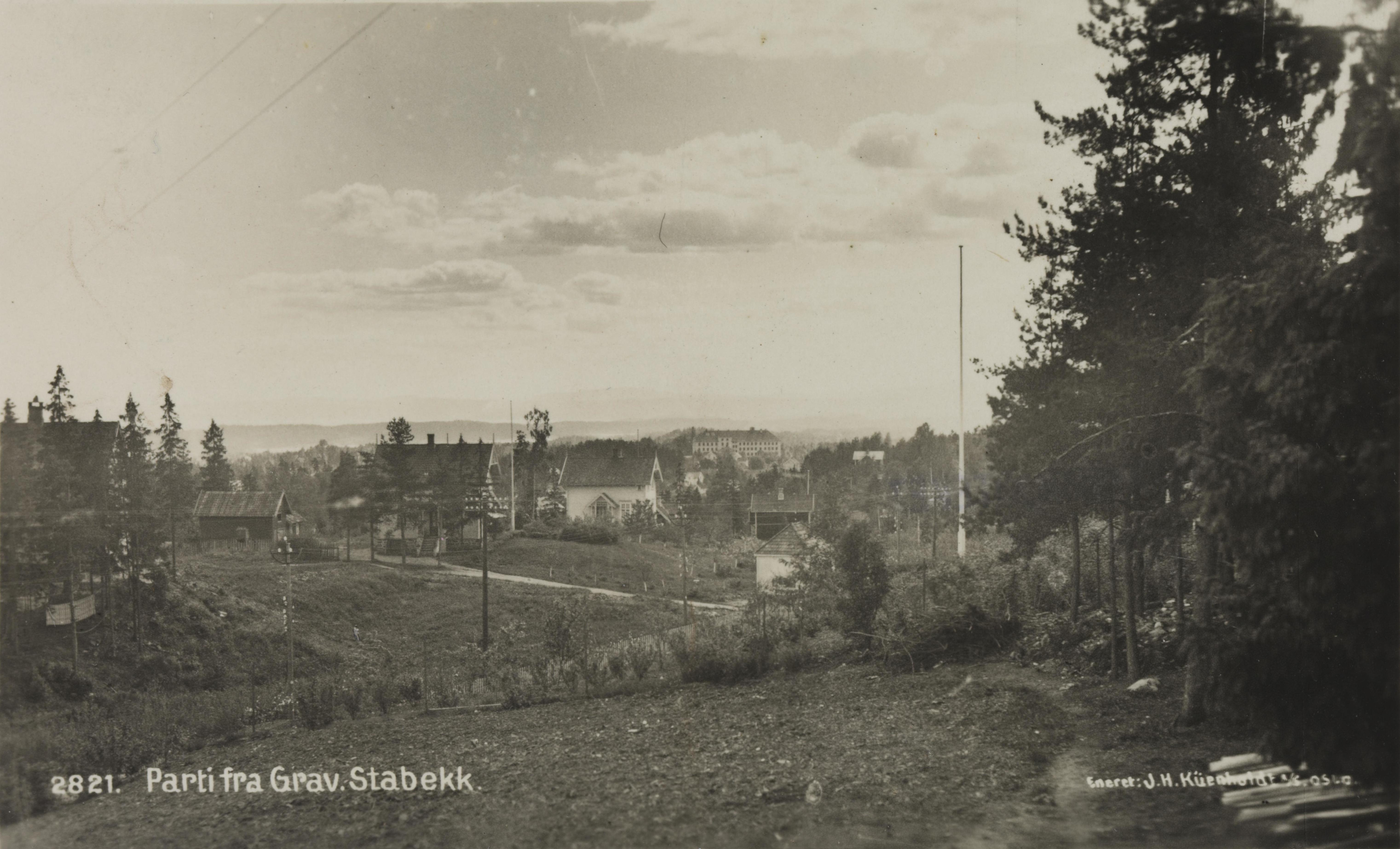 Bildet er hentet fra Nasjonalbibliotekets bildesamling Grav,Stabekk, Bærum, Akershus